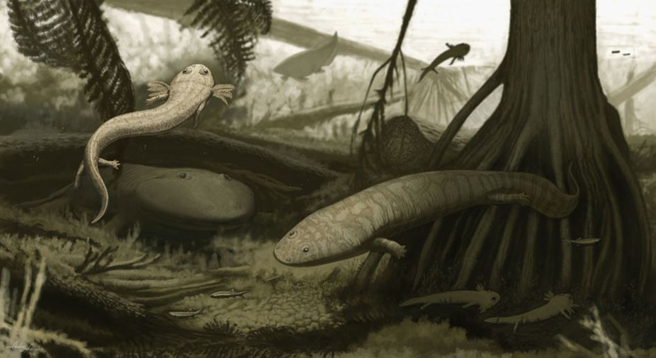 The small dvinosaur Timonya anneae is depicted in the foreground left, the trimerorhachid dvinosaur Procuhy nazariensis is on the right, and the rhinesuchid in the left background. Other species represented are: a dipnoan, primitive actinopterygians, Psaronius tree-ferns, Teresinoxylon trees and small columnar stromatolites.